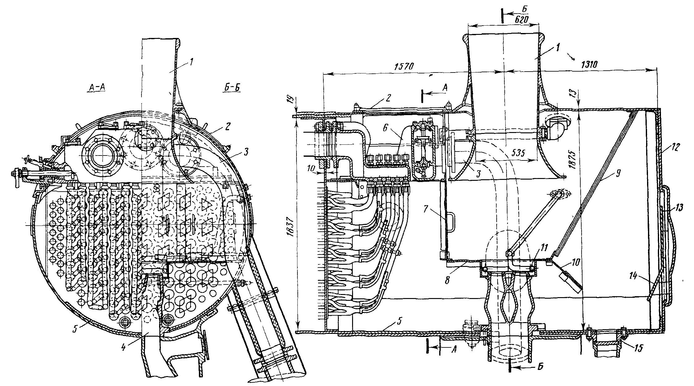 Устройство дымовой коробки паровозов ФД и ИС. 1 - дымовая труба; 2 - крышка над коллектором; 3 - паровпускная труба; 4 - конус; 5 - предохранительный лист; 6 - коллектор пароперегревателя; 7 - вертикальный лист искроудержателя; 8 - вертикальный лист; 9 - искроудержательная сетка; 10 - отбойная заслонка; 11 - сифон; 12 - фронтонный лист; 13 - дверца; 14 - отражательный лист; 15 - мусороочистительная труба.